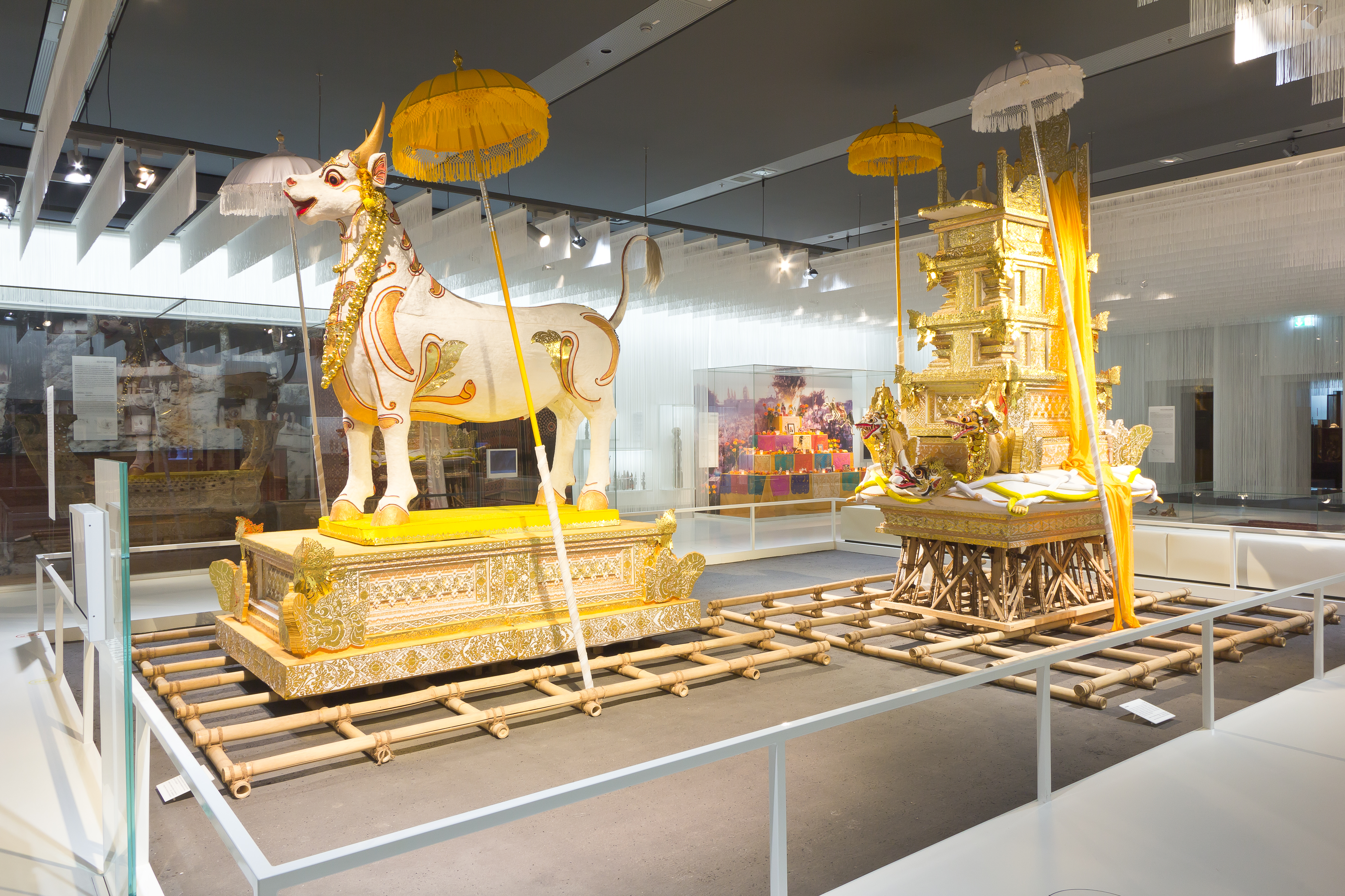 Thema des Raumes: Bestatten Verbrennung - Der Weg zur Wiedergeburt – Totenverbrennung auf Bali, Indonesien